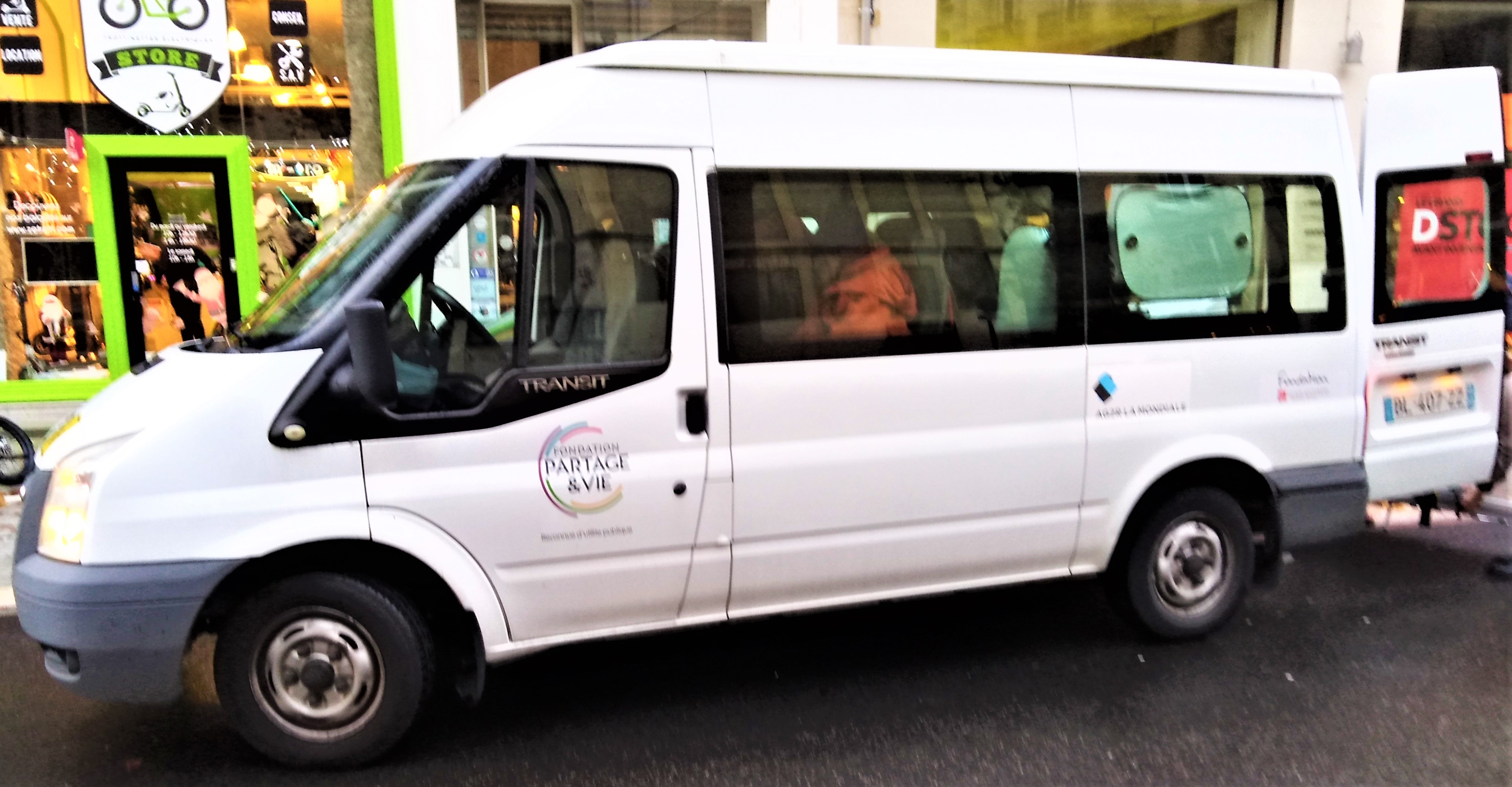 Véhicule de transport pour personnes handicapées